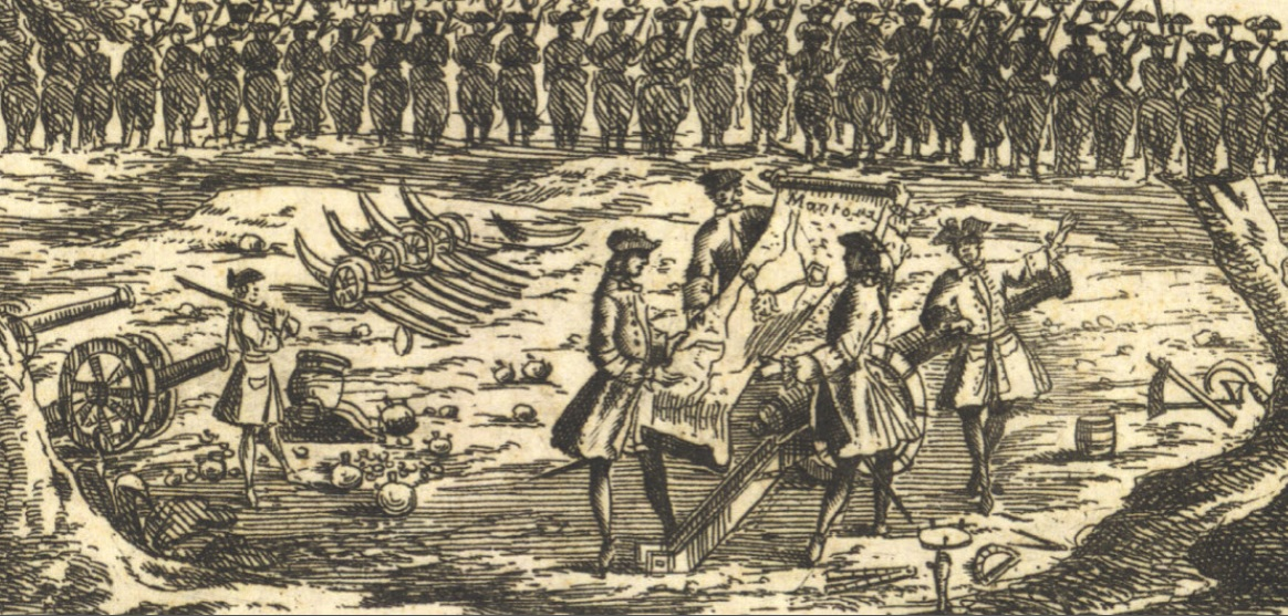 Assedio e resa della Mirandola alle armi spagnole il giorno 31 agosto 1735 (particolare Mantova)